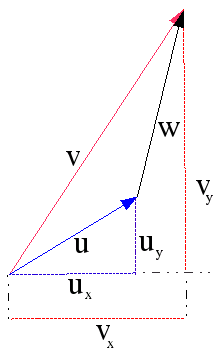 Vetor subtrac